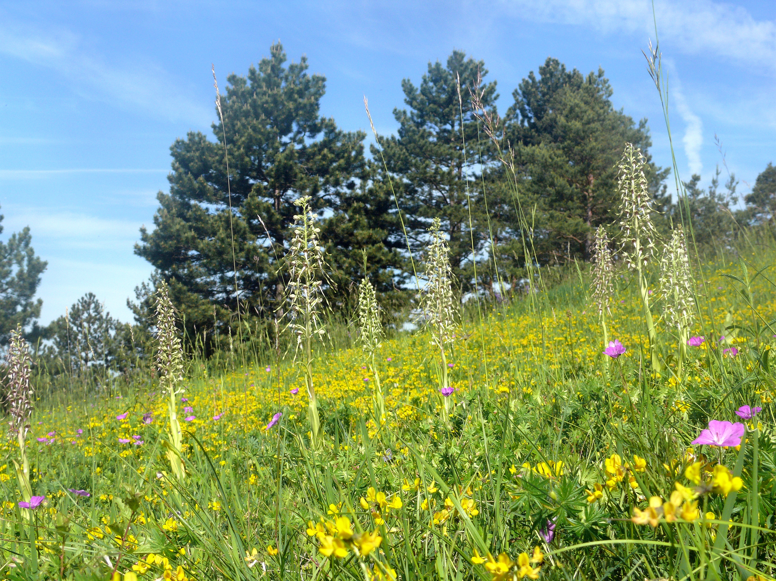 Himantoglossum hircinum, Bauland, Deutschland